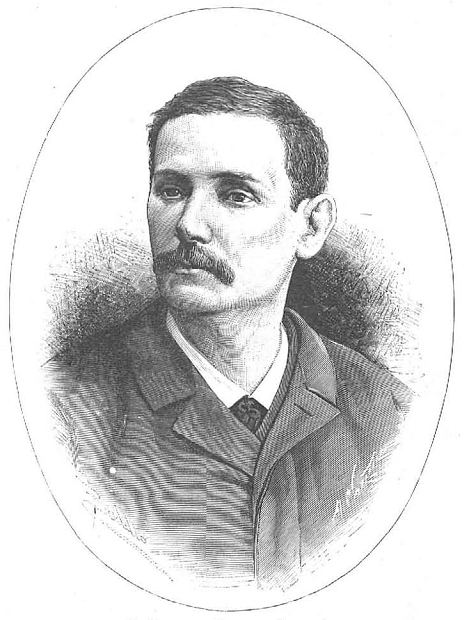 Retrato de Benito Pérez Galdós, en La Ilustración Española y Americana.